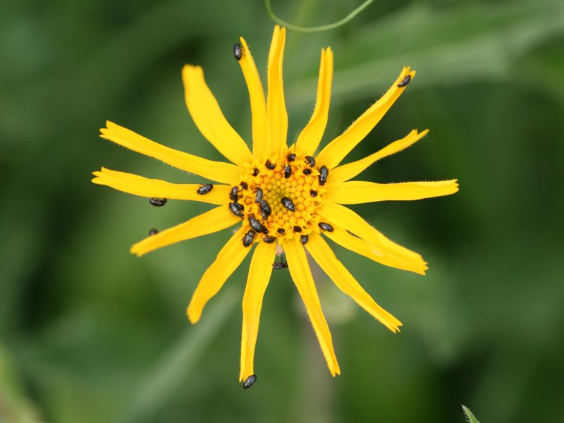 Berg-Wohlverlei (Arnica montana im Quaßliner Moor. mit Meligethes)